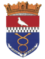 Blason du village de Bazemont